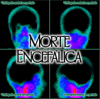 4 incidências de uma reconstrução de PET-SCAN cintilografia mostrando ausencia de perfusão cerebral. ME (Morte encefálica)